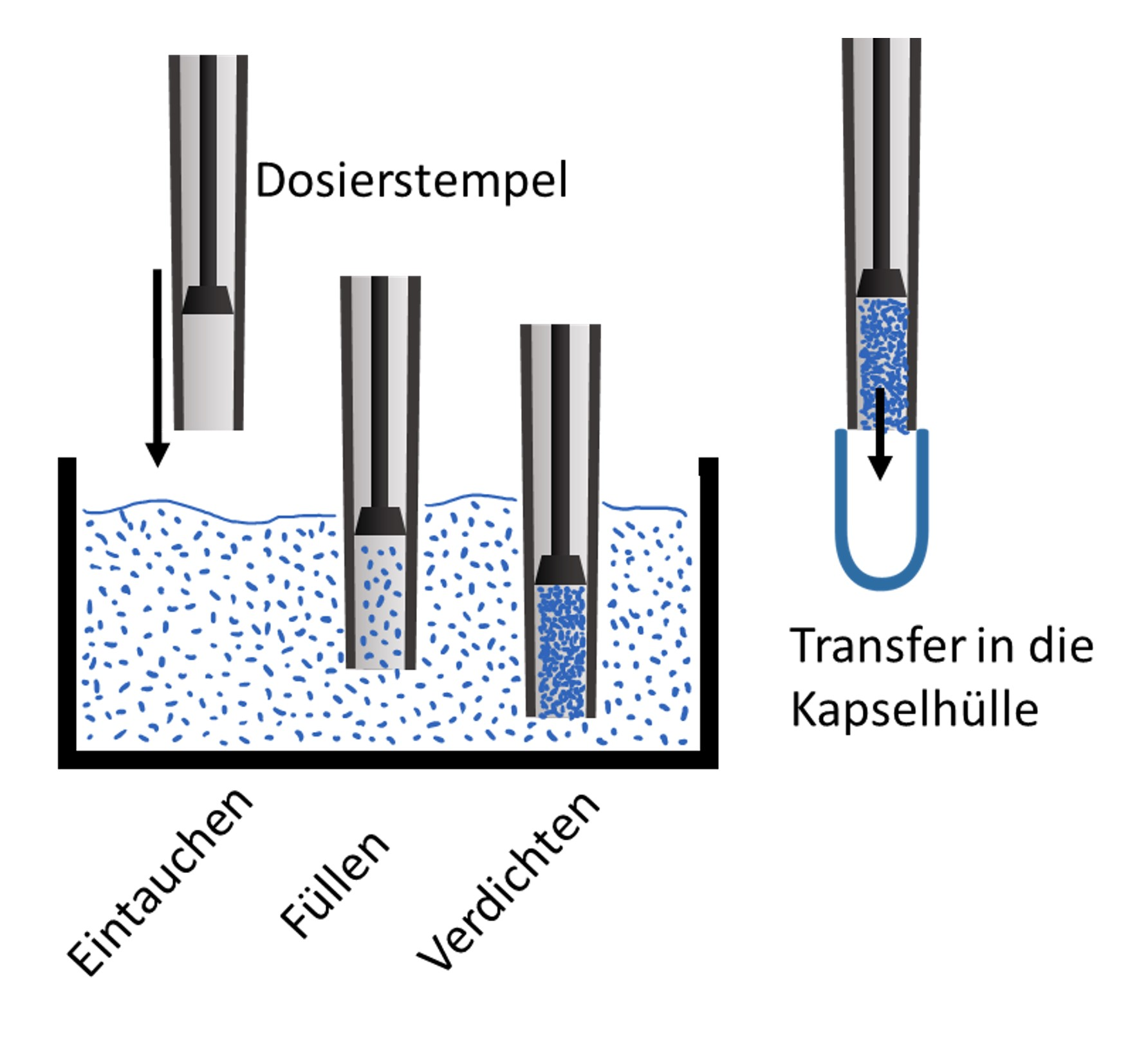 Der Röhrchendosierer ist eine Methode um Kapseln in der pharmazeutischen Industrie zu befüllen und das Füllgut zu dosieren.